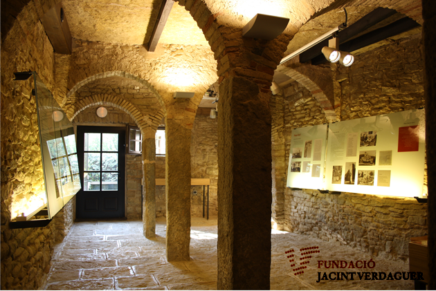 Observem la sala de la planta baixa de la Casa Museu Verdaguer. A l'època en què hi vivia el poeta Jacint Verdaguer aquesta sala eren les antigues corts del bestiar.